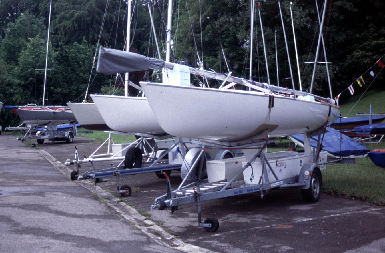 Segelboot (Dyas) transportfertig auf Trailer verladen